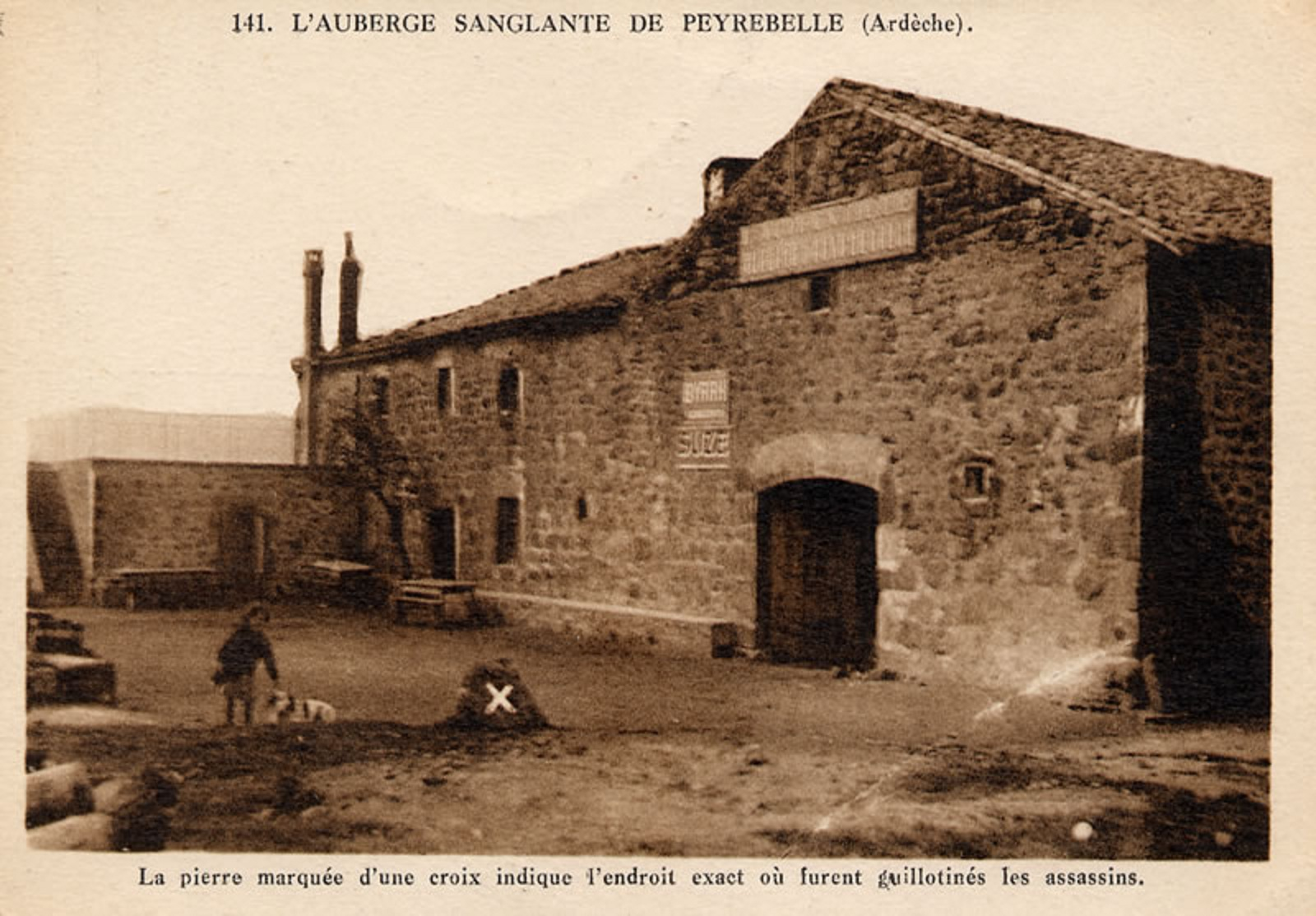 L'auberge sanglante de Peyrebeille